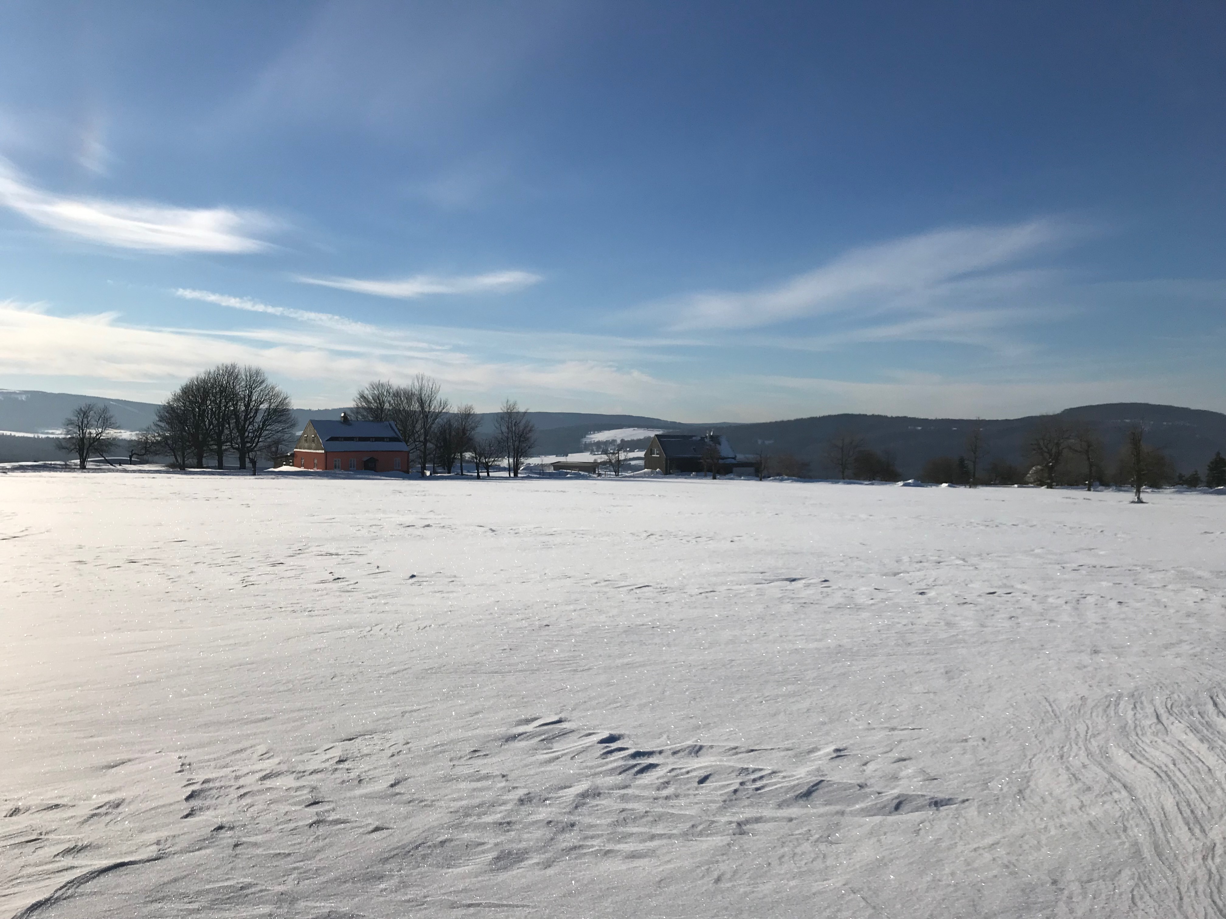 směrem na Křížatky